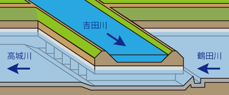 宮城県宮城郡松島町幡谷に築造されたサイフォン式の排水路である吉田川サイフォンの断面図